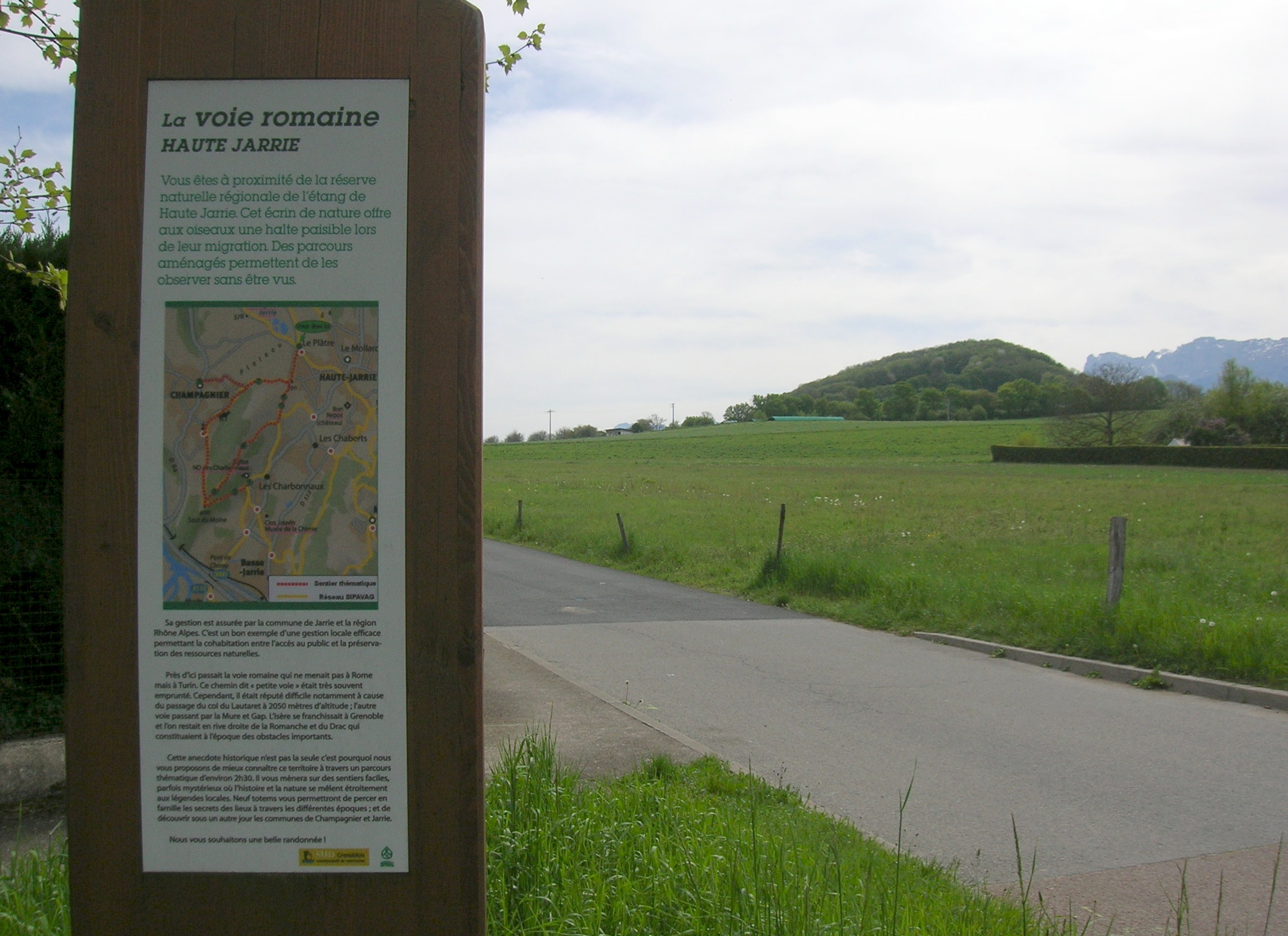 voie romaine à Haute-Jarrie. Jarrie, Isère, France.